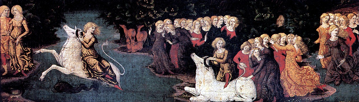 Pittura italiana del Quattrocento al Louvre, Parigi